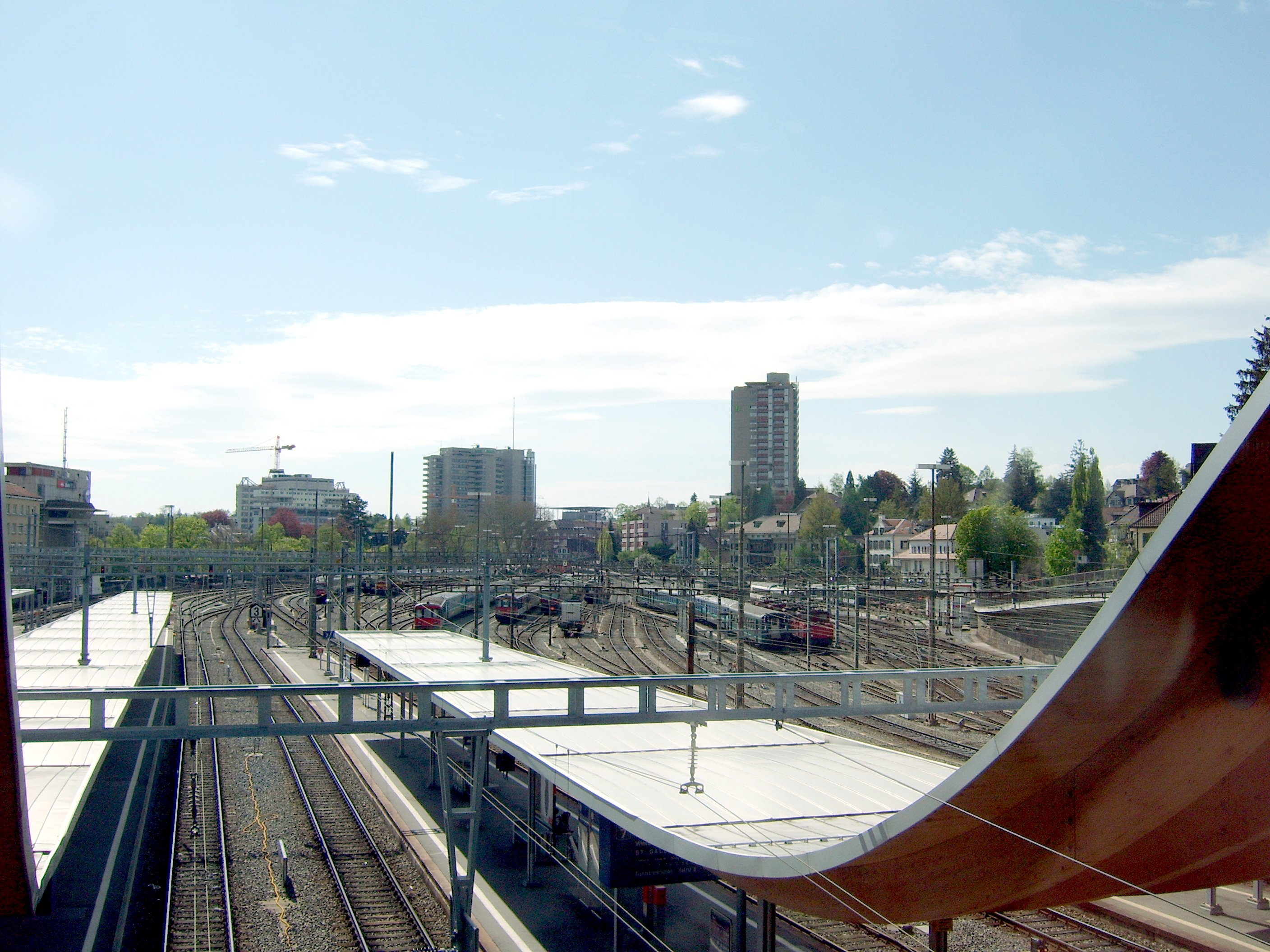 Sortie de la gare de Bern vers l'ouest depuis la passerelle en mai 2008